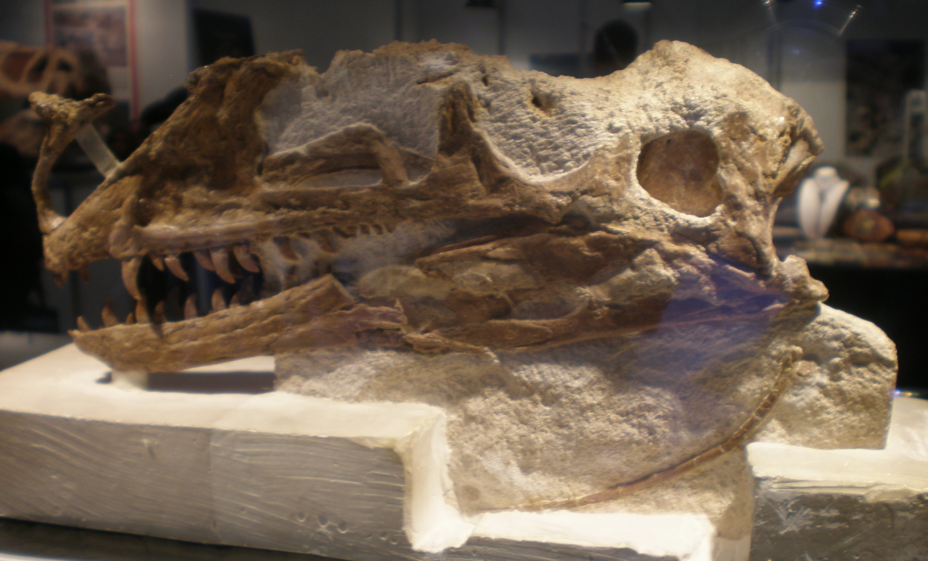 Holotype of Proceratosaurus bradleyi, taken at "TheMunichShow"